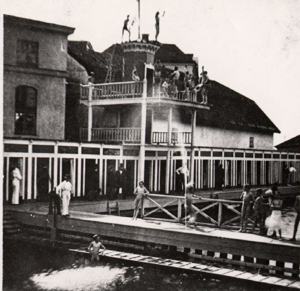 Gjörckeska badinrättningen på Riddarholmen. Anläggningen ritad av Georg Theodor Chiewitz 1844